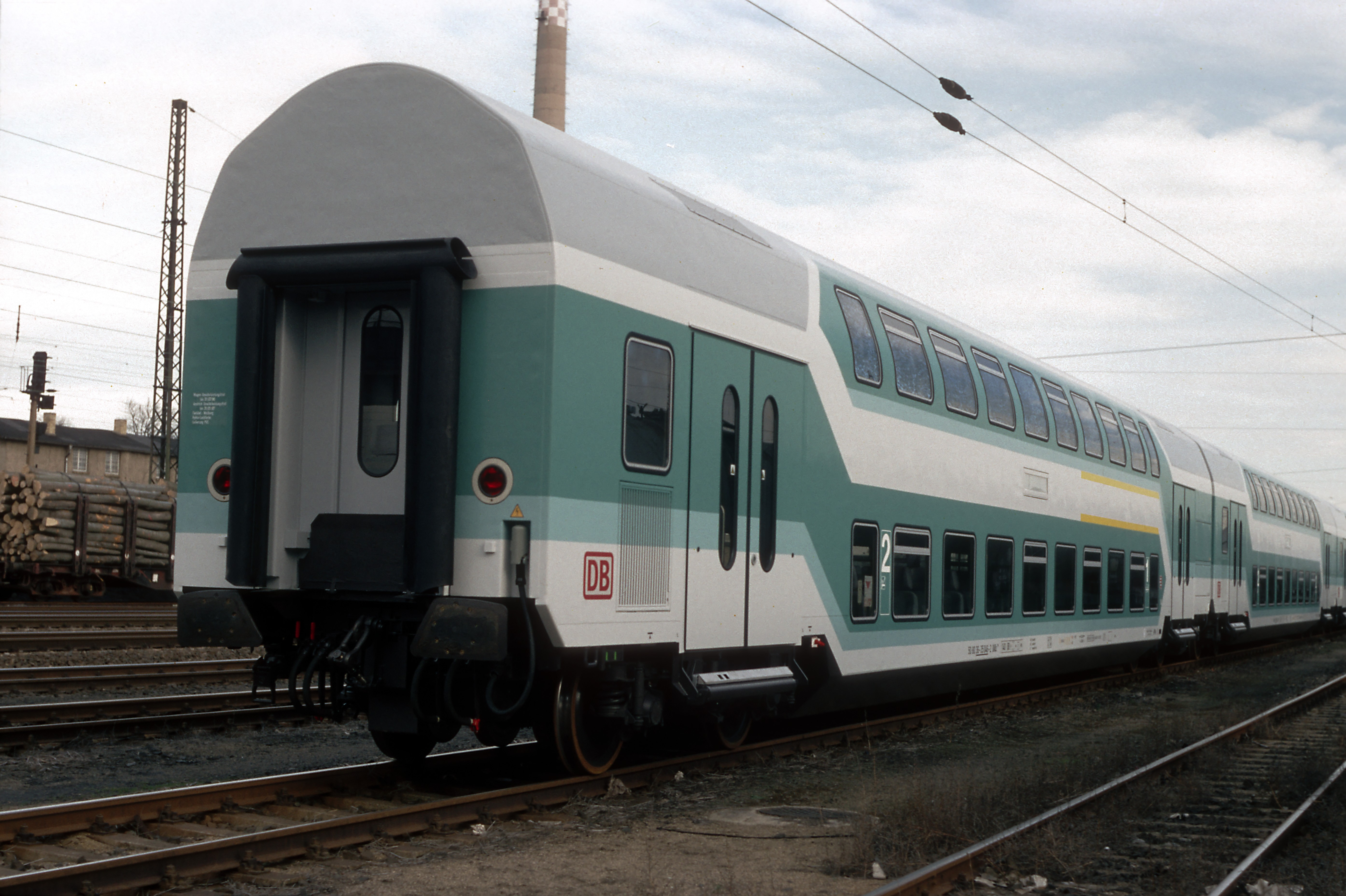 Doppelstockwagen mit Hocheinstiegen für das ex-DB-Netz bei der Ablieferung, Bf Engelsdorf